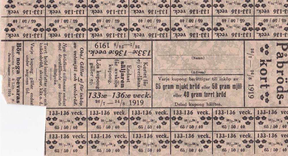 Ransoneringskort: påbrödskort 1919, berättigande till inköp av viss mängd bröd och mjöl utöver normalransonen, vilket kunde tilldelas personer med tungt arbete (i Sverige i bruk under åren 1917—1919)